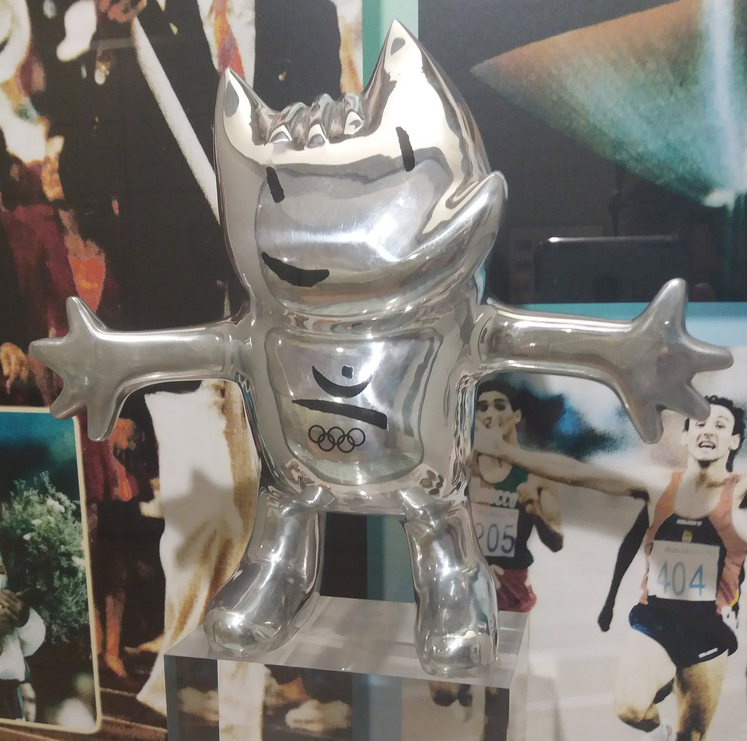 Un Cobi en la Casa de la Moneda en Madrid.